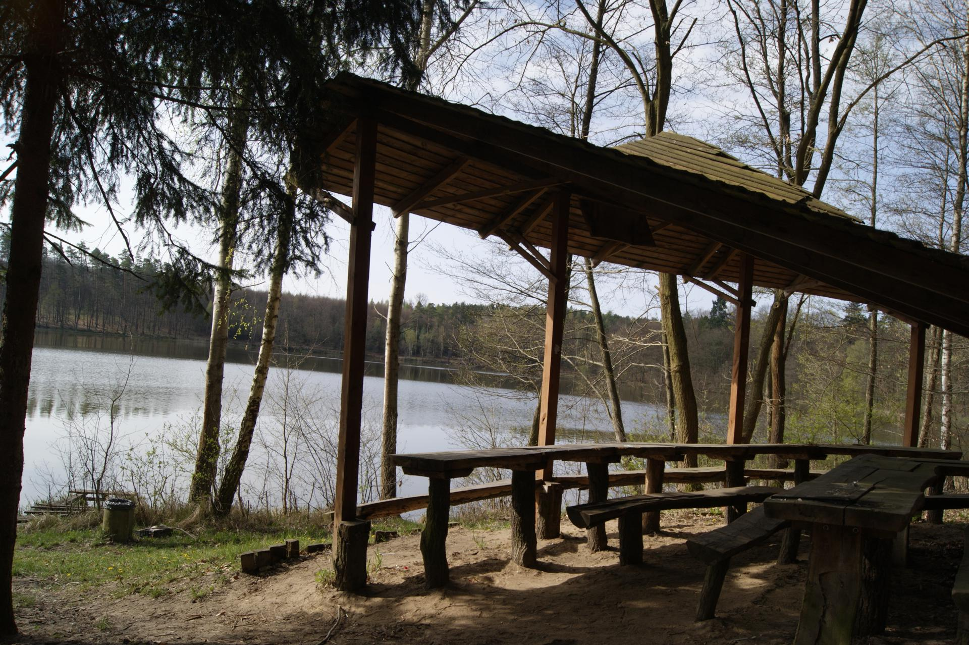 Miejsce odpoczynku nad jeziorem Sulemińskim